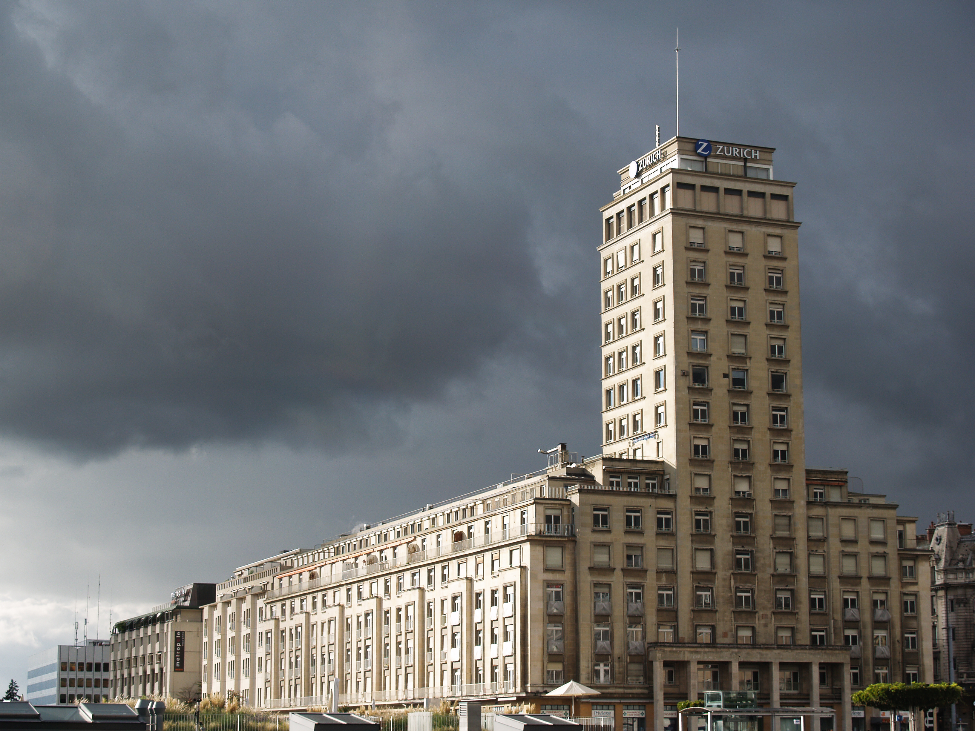 Vue de la Tour Bel-Air, Lausanne depuis le Grand-Pont